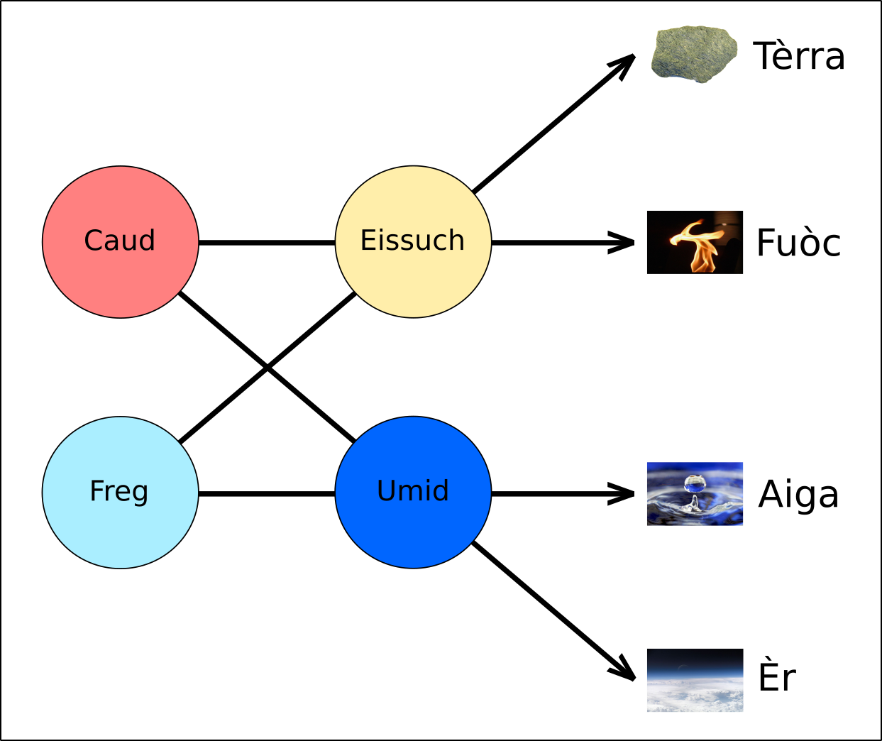 Esquèma generau dei quatre elements terrèstres e de sei proprietats associadas segon la teoria aristoteliciana.